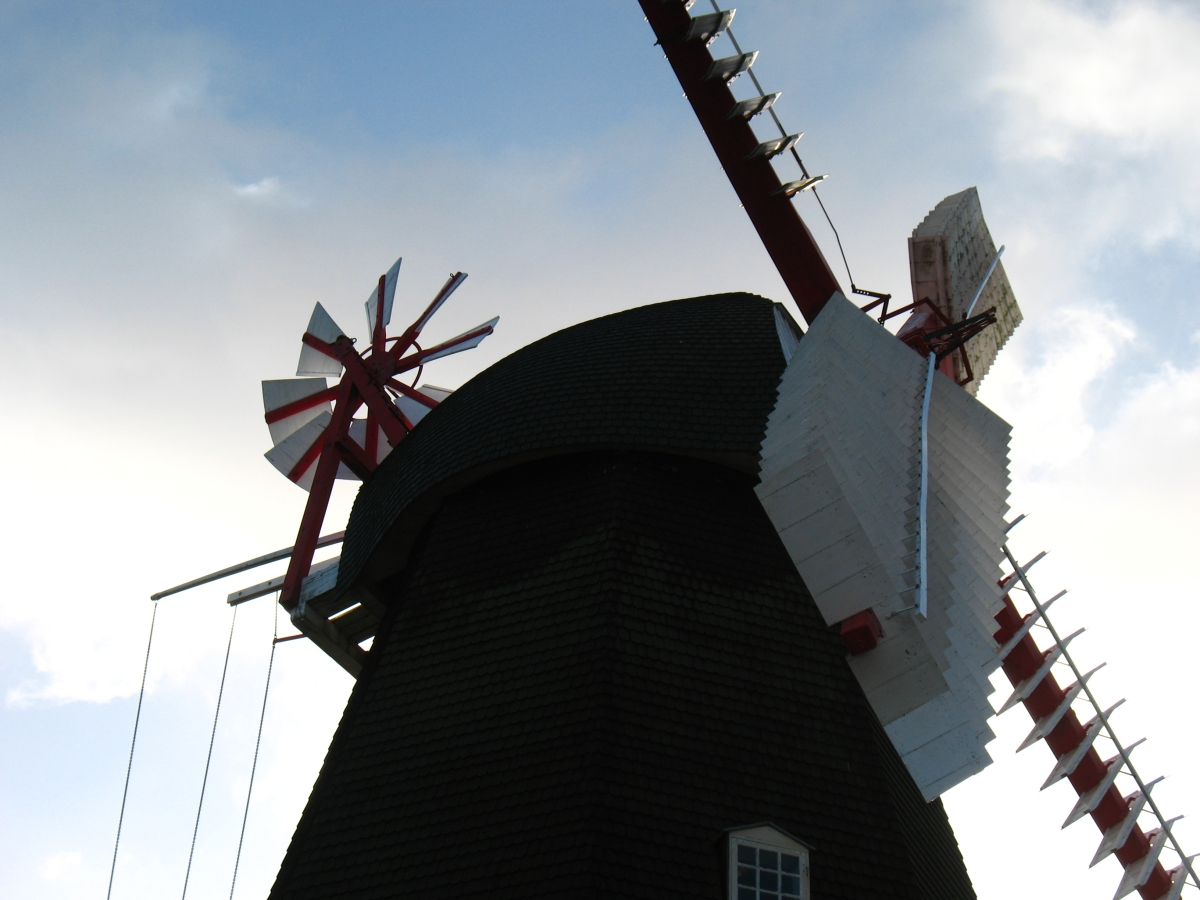 Lumby Mølle, Slettensvej 294, Odense. Eget foto, Noorse Licentie: CC-BY-SA-3.0 Forminsket versjon for Wikipedia